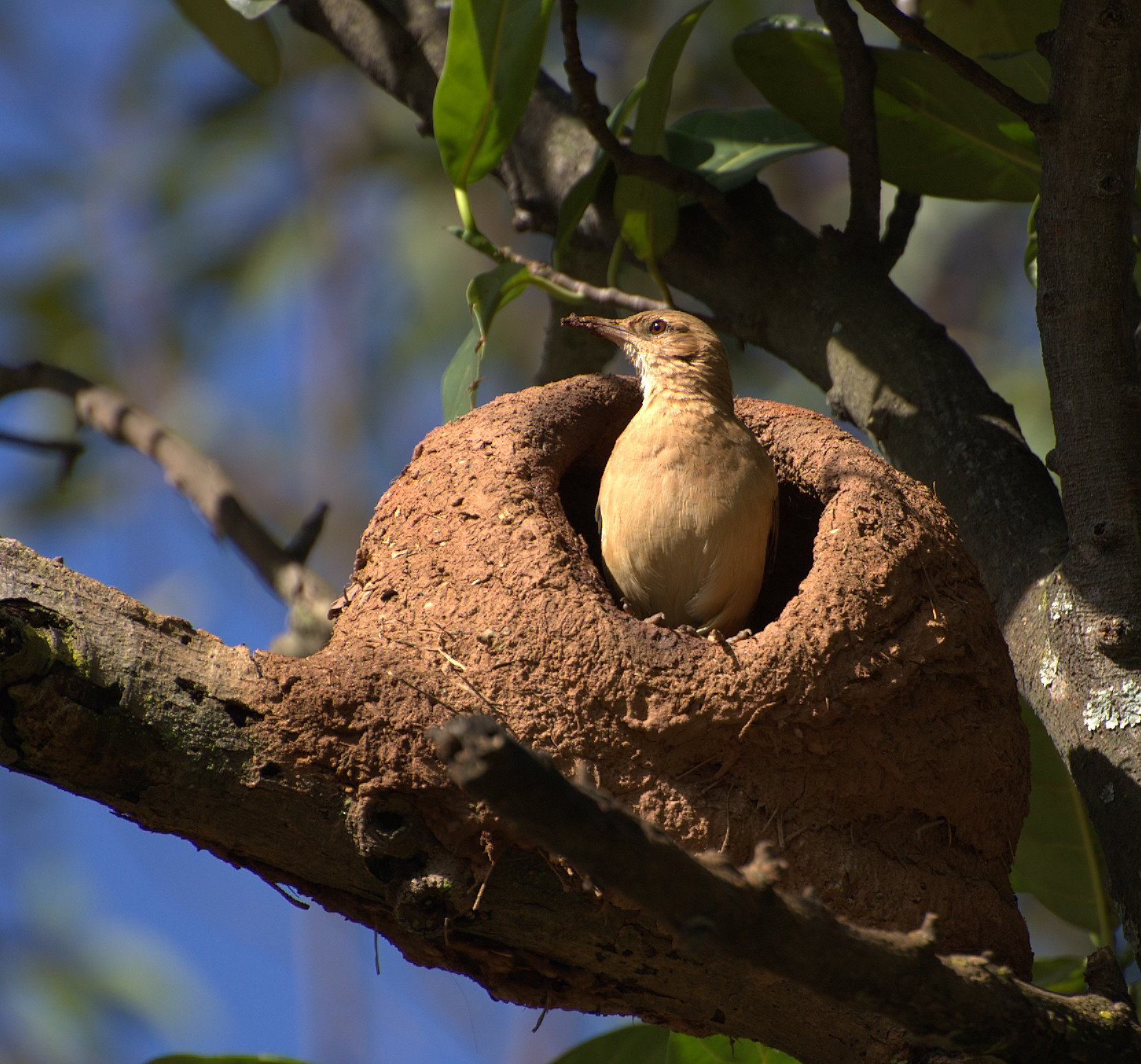 SÉRIE JOÃO-DE-BARRO Parque da Independência, Museu do Ipiranga, São Paulo